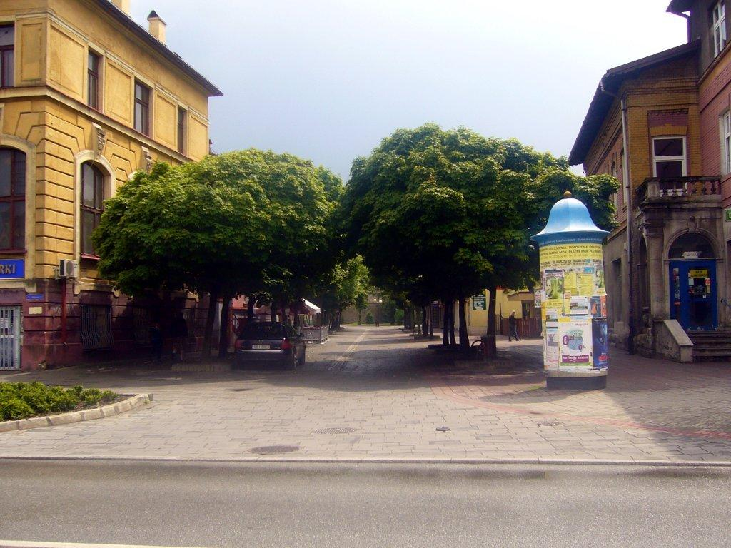 Ulica Słowackiego, widok z pl. Wolności w maju 2010.